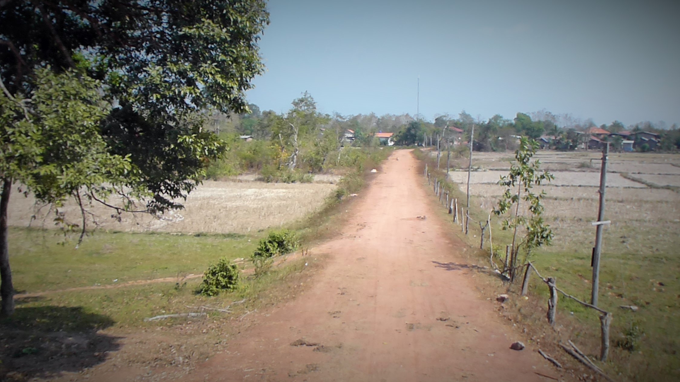 Khong Island.Sur la piste des éléphants, au départ du village des éléphants Ban Khiet Ngong pourle site de Phou Asa Mountain.- Laos.